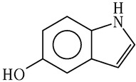 5-hidroxiindol szerkezeti képlete